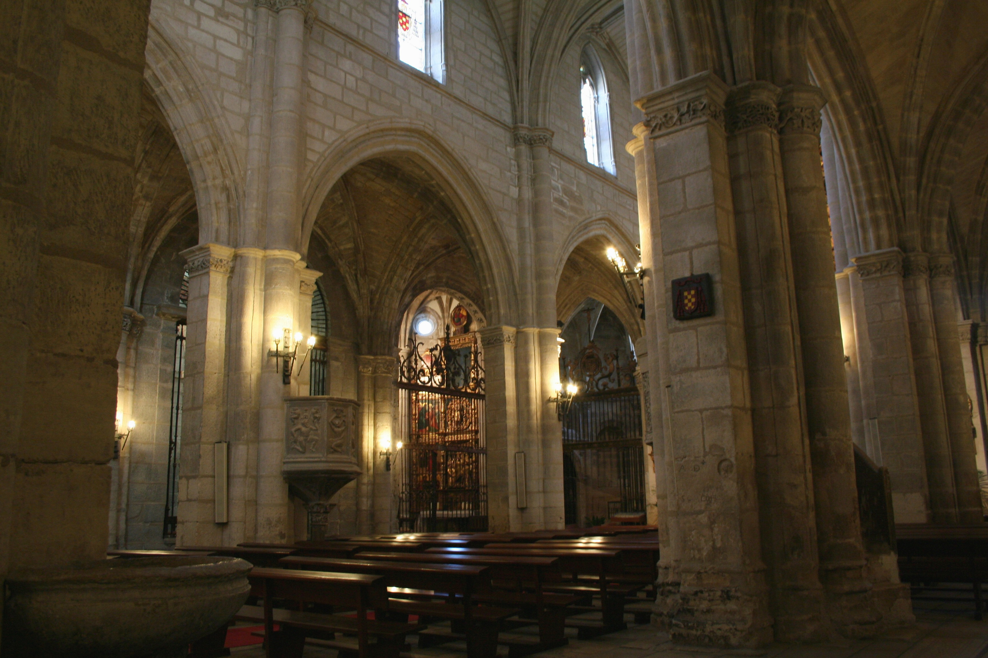 Iglesia Santa María Magdalena - Villa de Torrelaguna (Madrid)